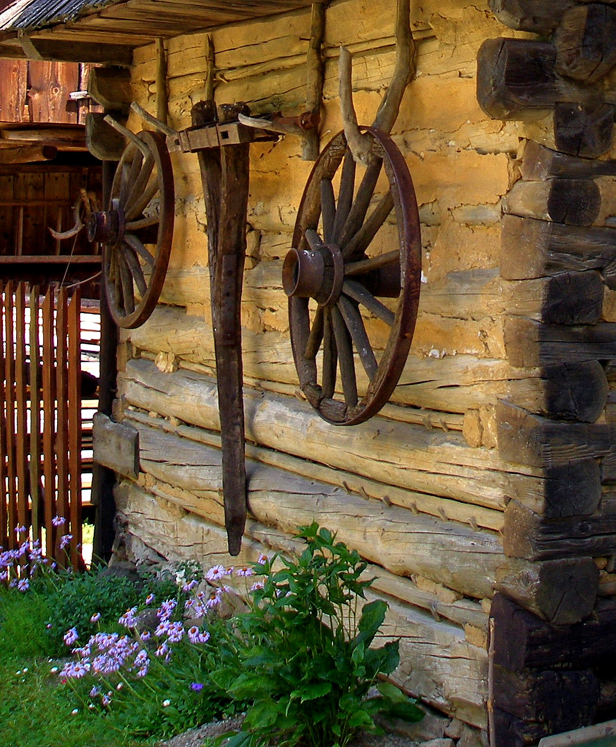 Časti roľníckeho náradia na roľníckej drevenici,rázovitá osada Lačnov, obec Lipovce. Okres Prešov